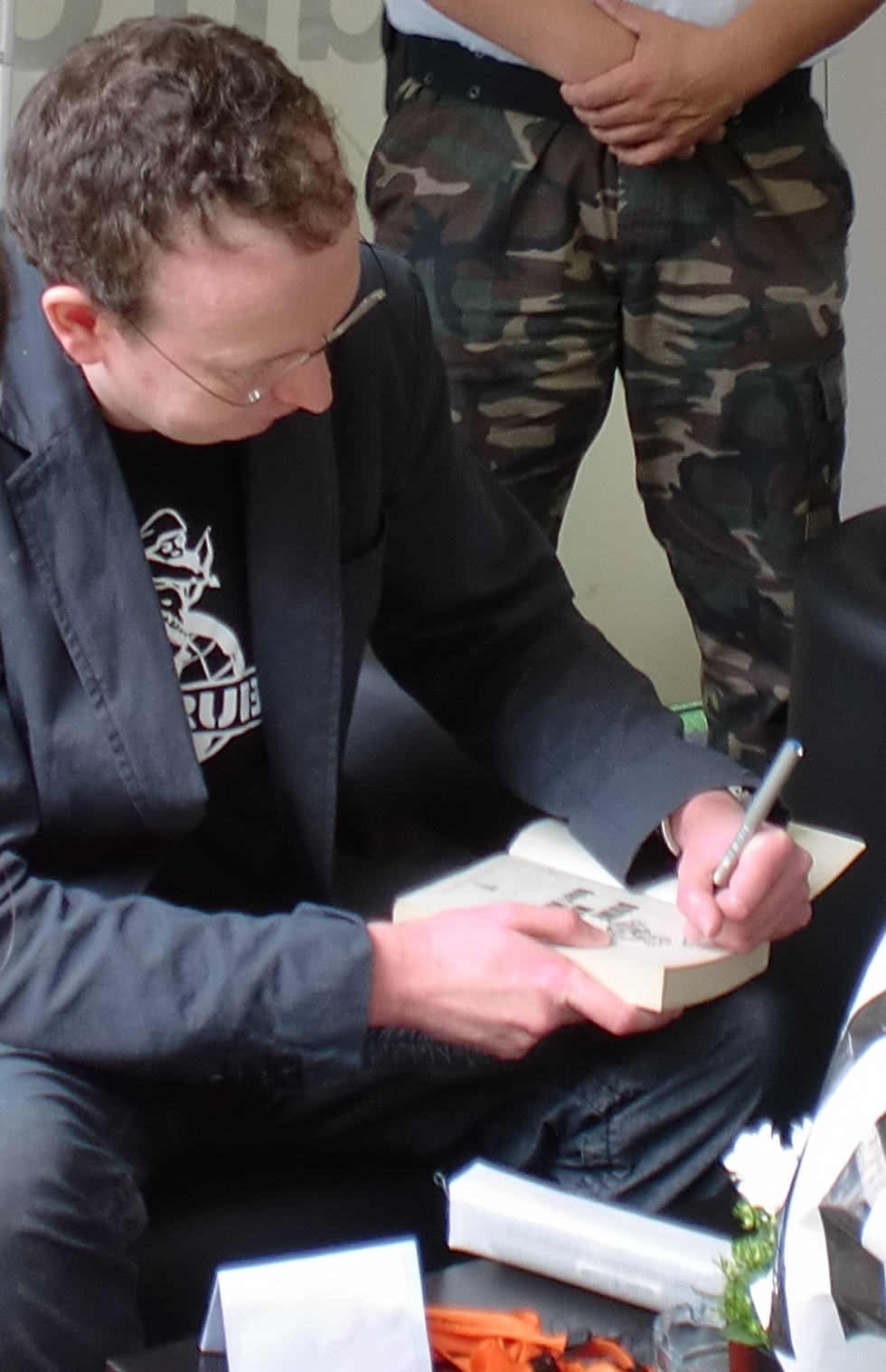 Robert Muchamore na Feira do Livro de Lisboa - edição 2011.